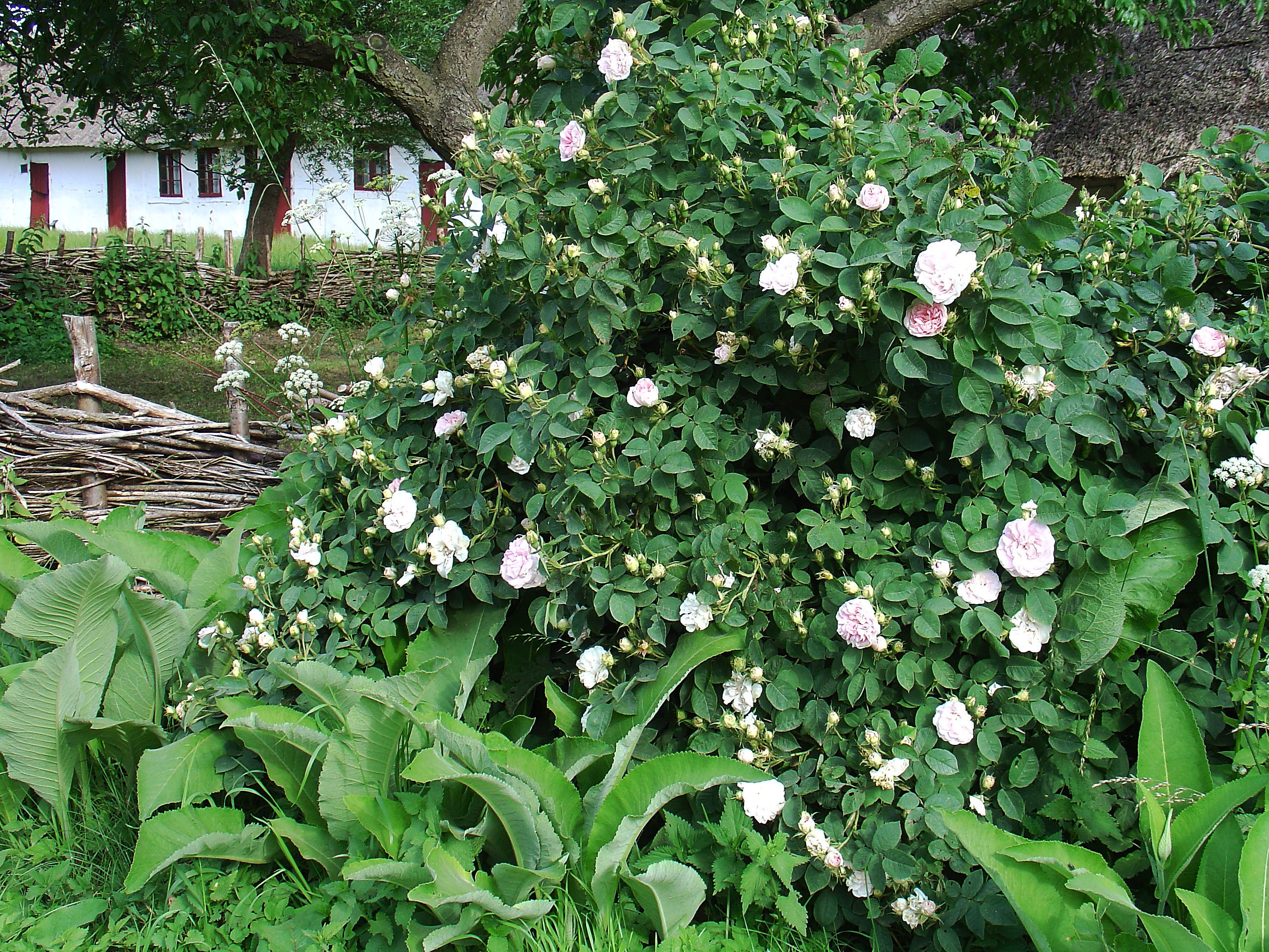 Blomstrende Maiden Blush-rose i hegnet ved haven fra Dannemare.